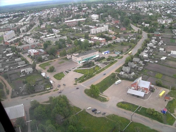 Часть посёлка Игра (Удмуртская Республика) с высоты птичьего полёта, справа внизу автовокзал.